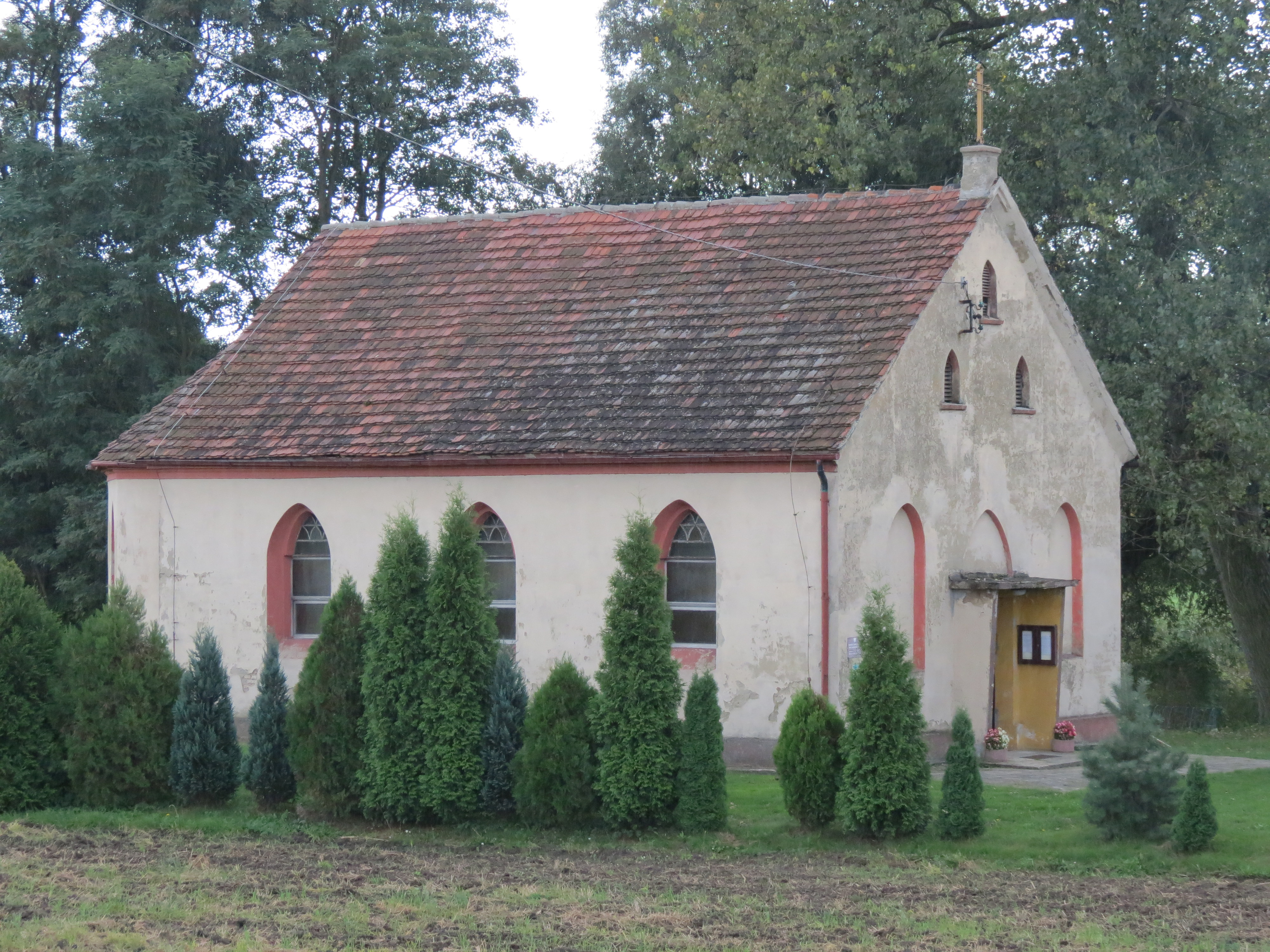 Zawada - kościół filialny p.w. świętego Marka (zabytek nr A/280/60)